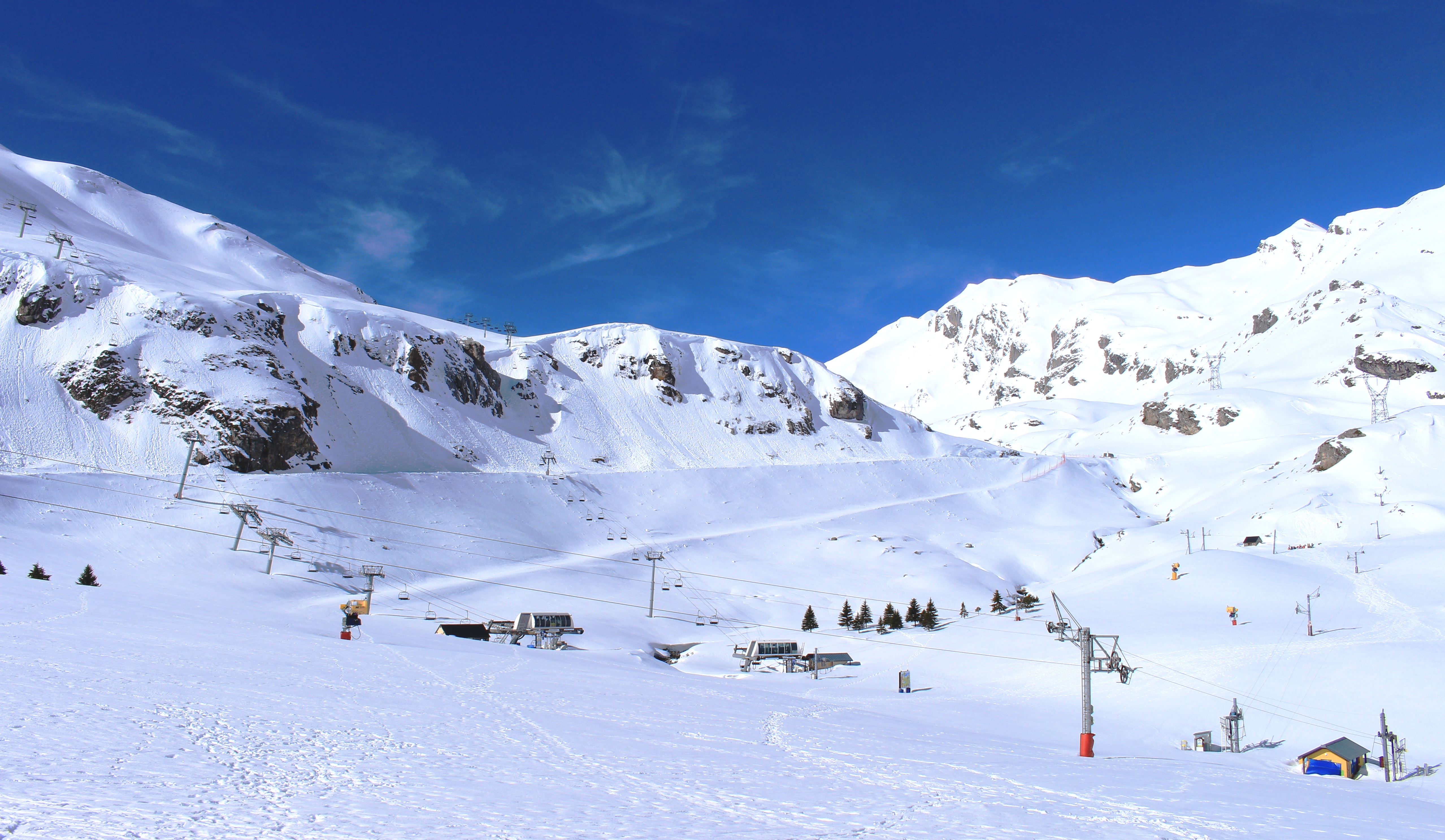 Station de Gavarnie (Hautes-Pyrénées)